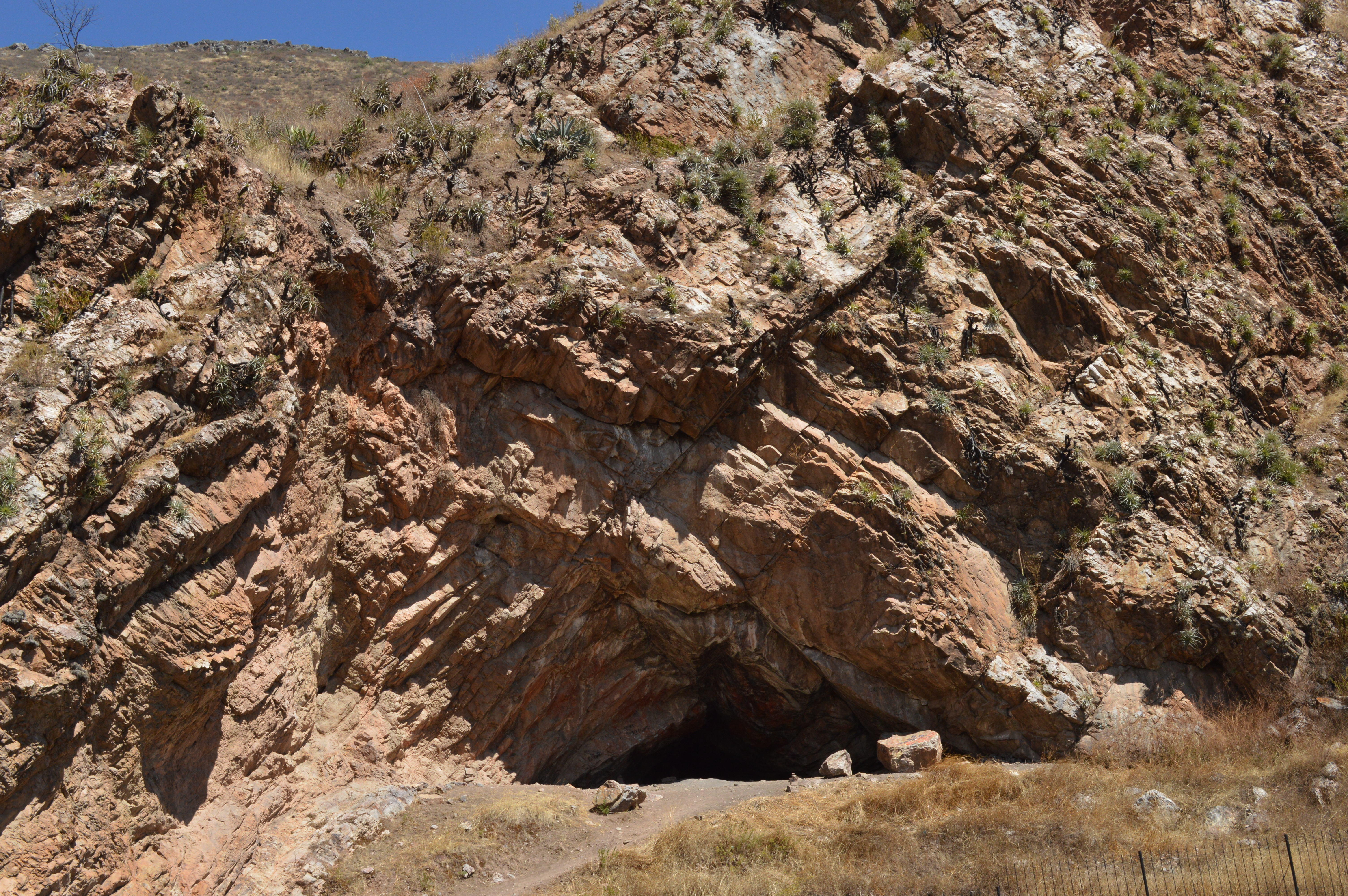 Vista desde el exterior en la Cueva de Guitarrero hacia el oeste, provincia de Yungay, distrito de Shupluy, Callejón de Huaylas, Perú. Foto tomada en julio de 2019.